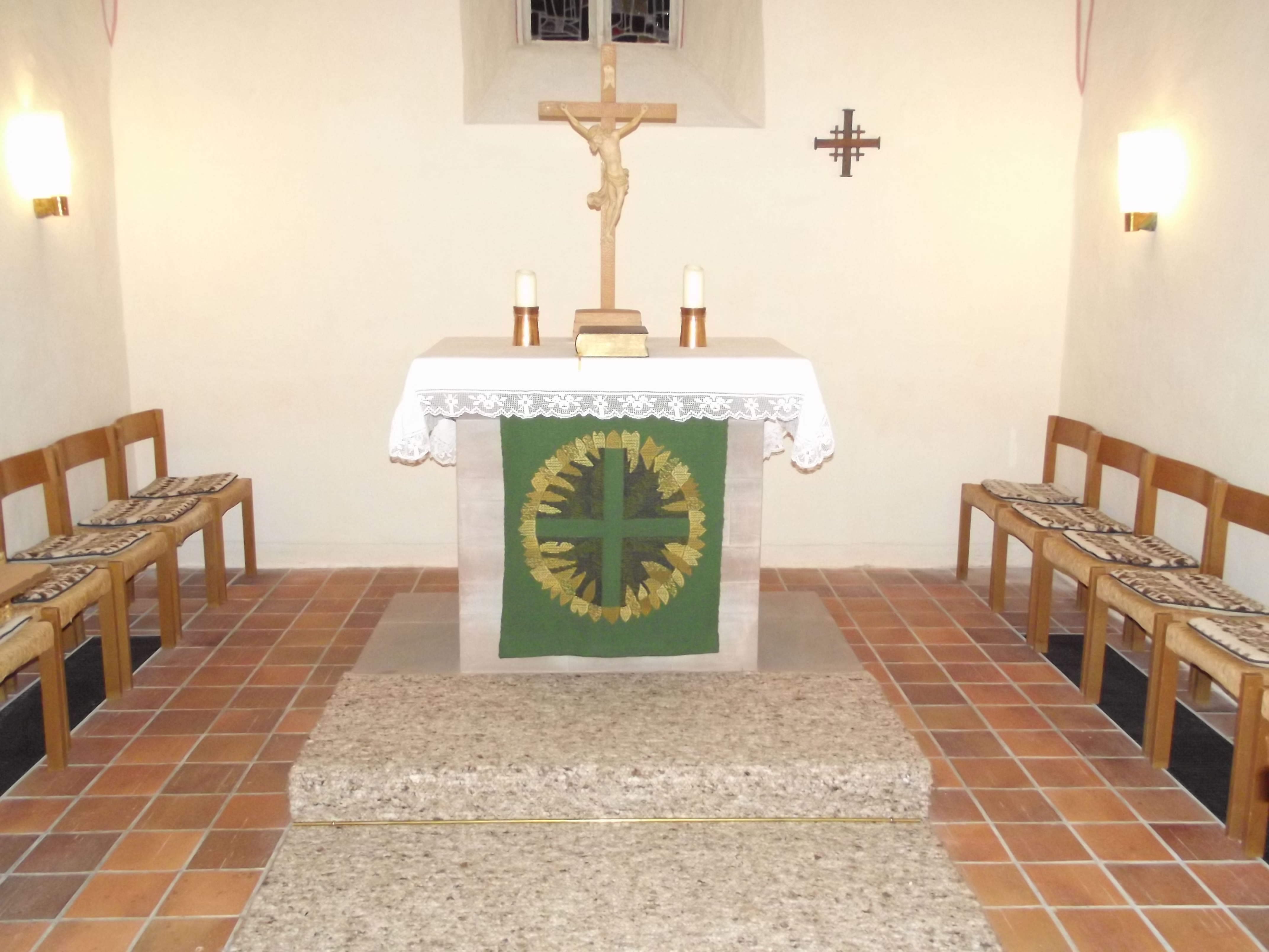 Katharinen-Kapelle in Steinheim (Hungen), Landkreis Gießen, Hessen